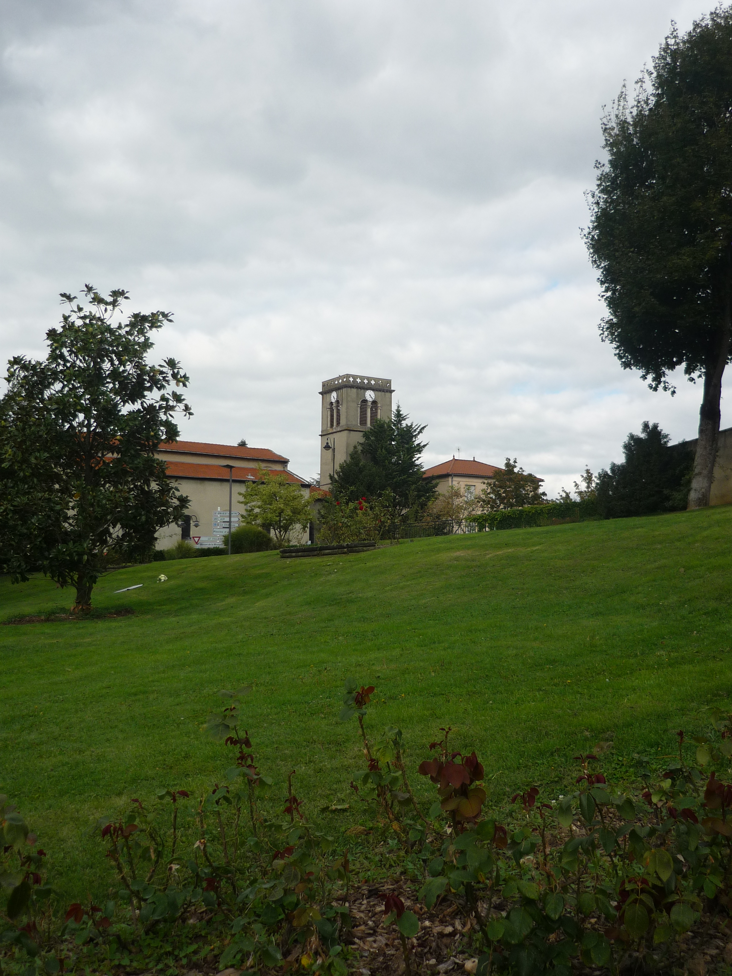 Château de Saint-Priest, dans le département du Rhône. Inscrit au titre des Monuments historiques depuis 1984. .